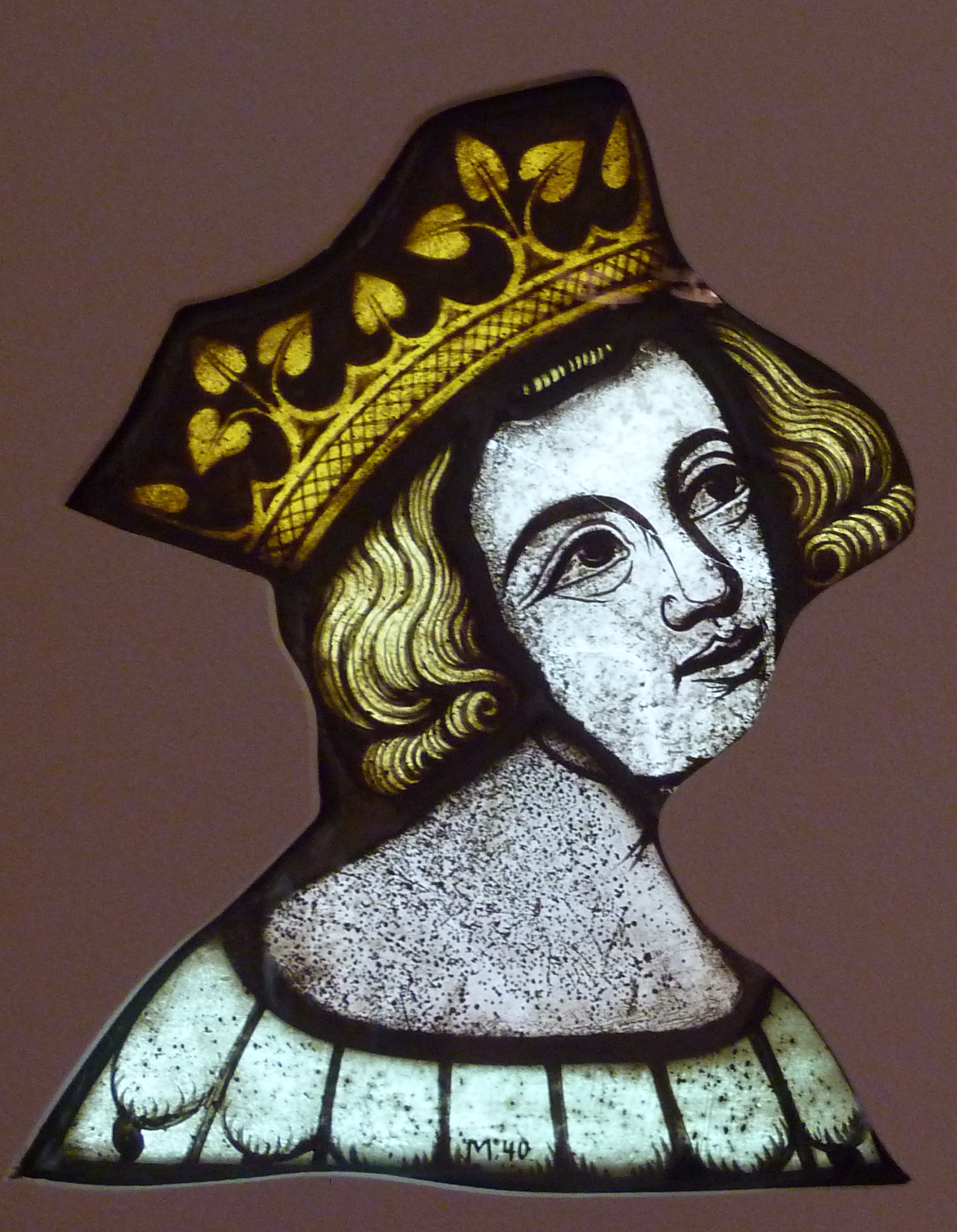 Bleiglasfenster im Museum Schnütgen in Köln, Darstellung: „Königskopf aus dem Dreikönigenfenster des Kölner Doms“, Köln um 1330/40, Inventar-Nr.: M 40, siehe Brigitte Lymant: Die Glasmalereien des Schnütgen-Museums. Schnütgen-Museum, Köln 1983